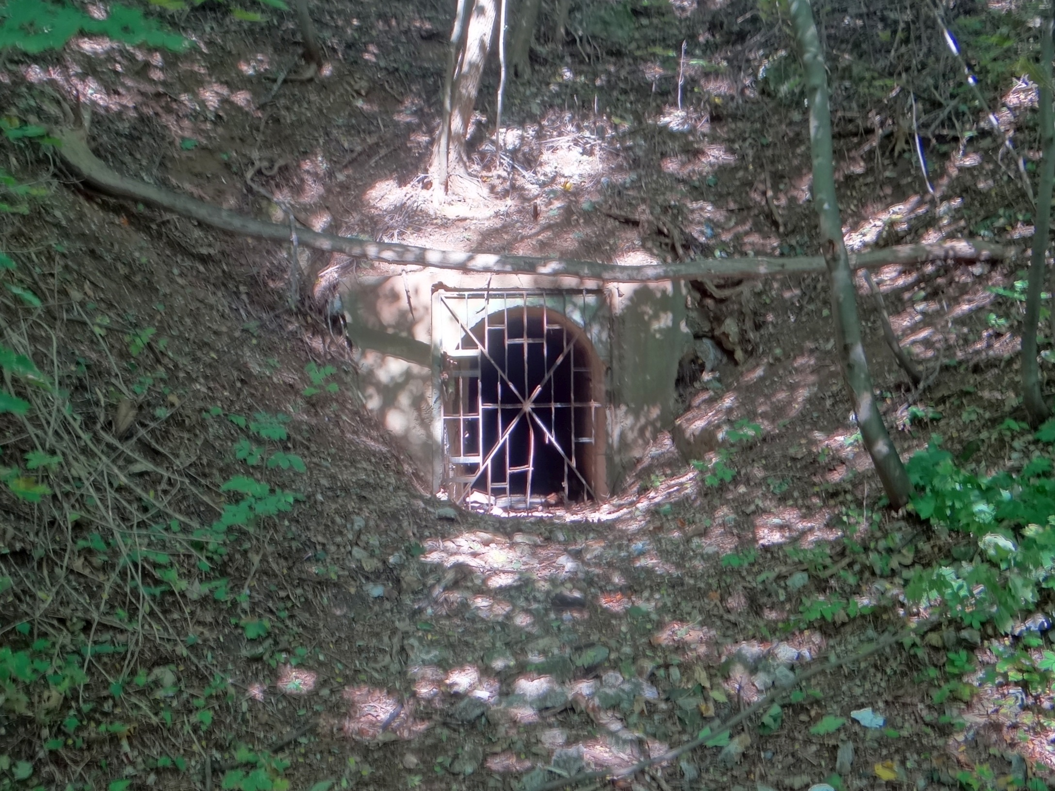 Kawerna Kostrze na wzgórzu Solnik w Krakowie